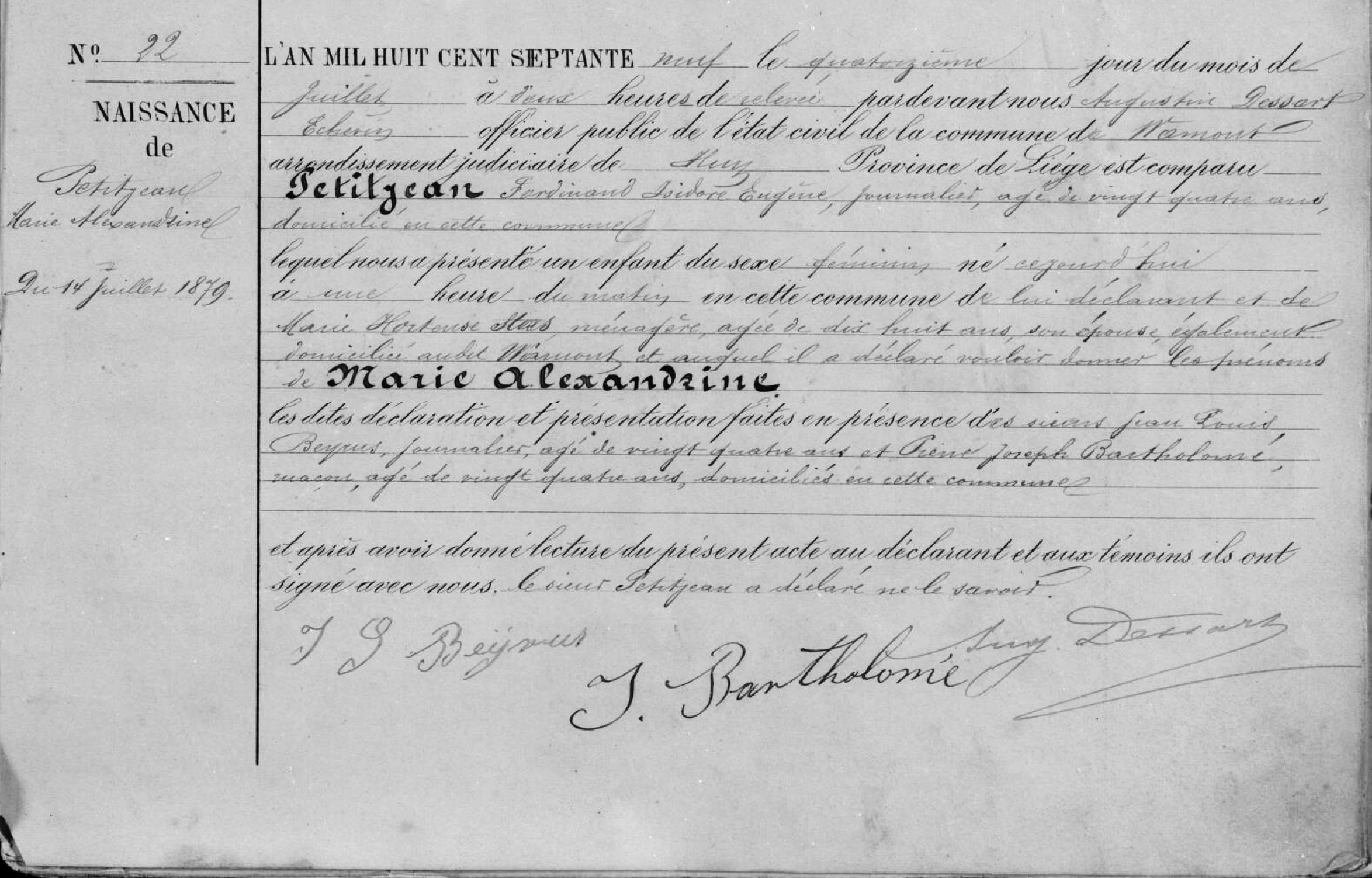 Acte de naissance de Marie-Alexandrine Petitjean - 14 07 1879 - Wamont